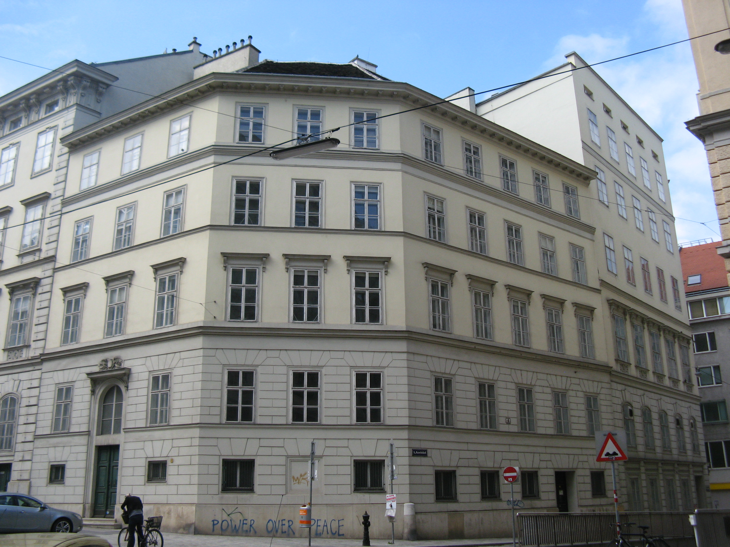 Auwinkel Nr. 4, Wien-Innere Stadt